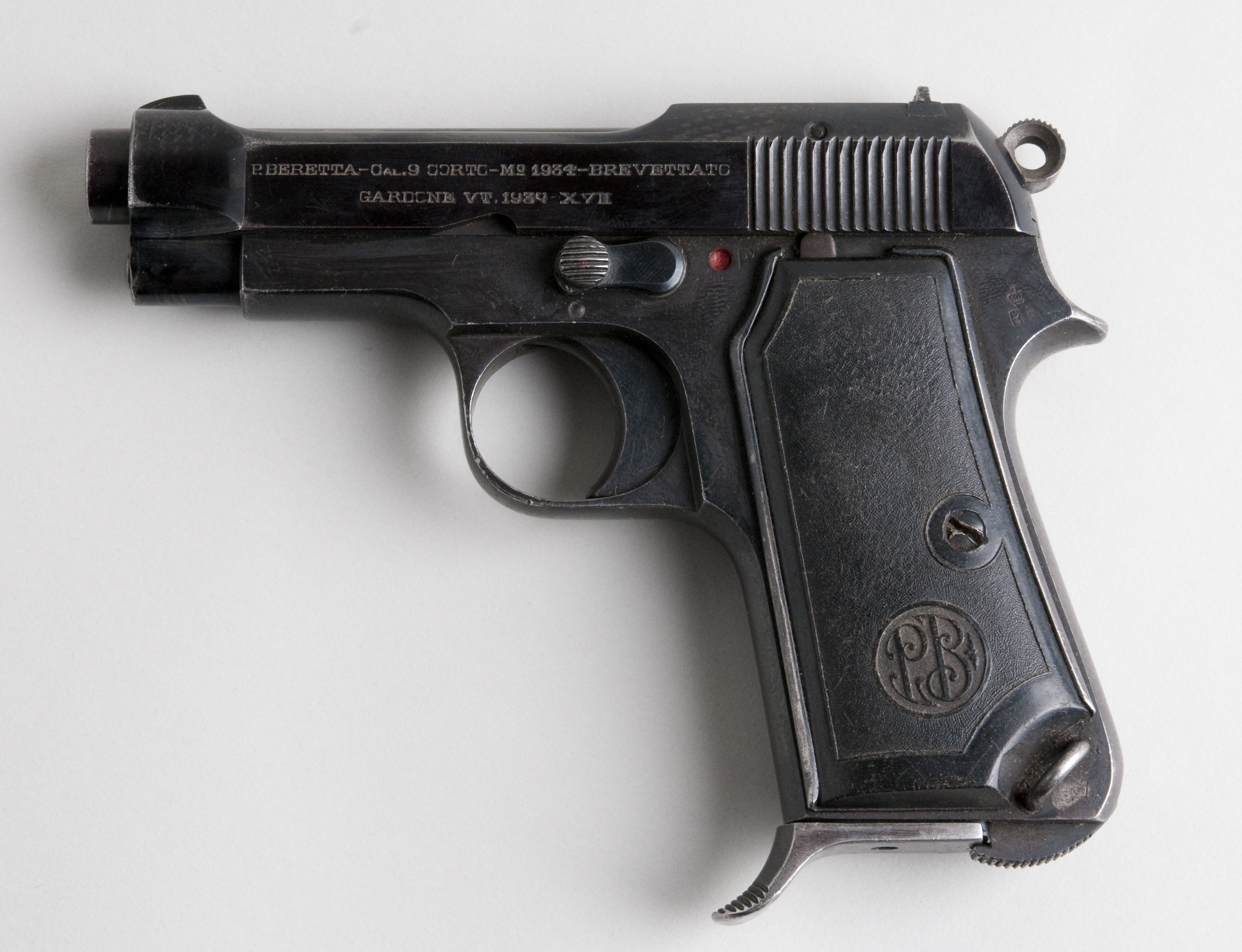 Beretta 34 From flickr user handvapensamlingen - Pistols used in Norway.